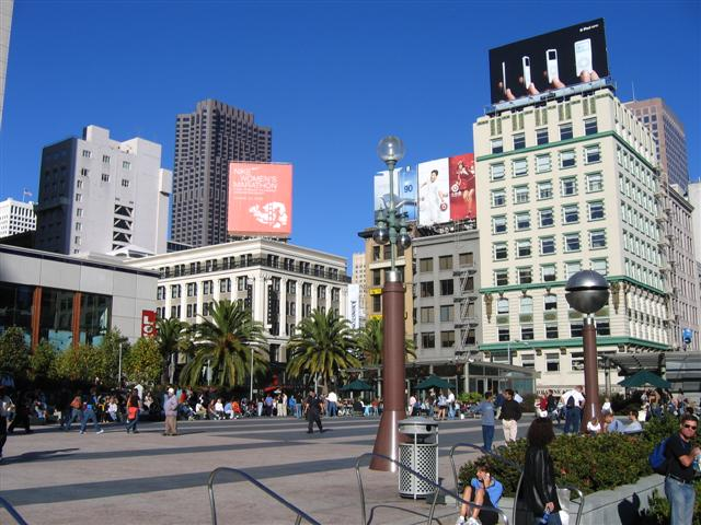 Централният площад в Сан Франциско Юниън Скуеър (Площад Съюз) в центъра на Сан Франциско, щата Калифорния, САЩ. (авторска снимка) Това е един от главните туристически райони на Сан Франциско, има много хотели и магазини в непосредствена близост до площада.